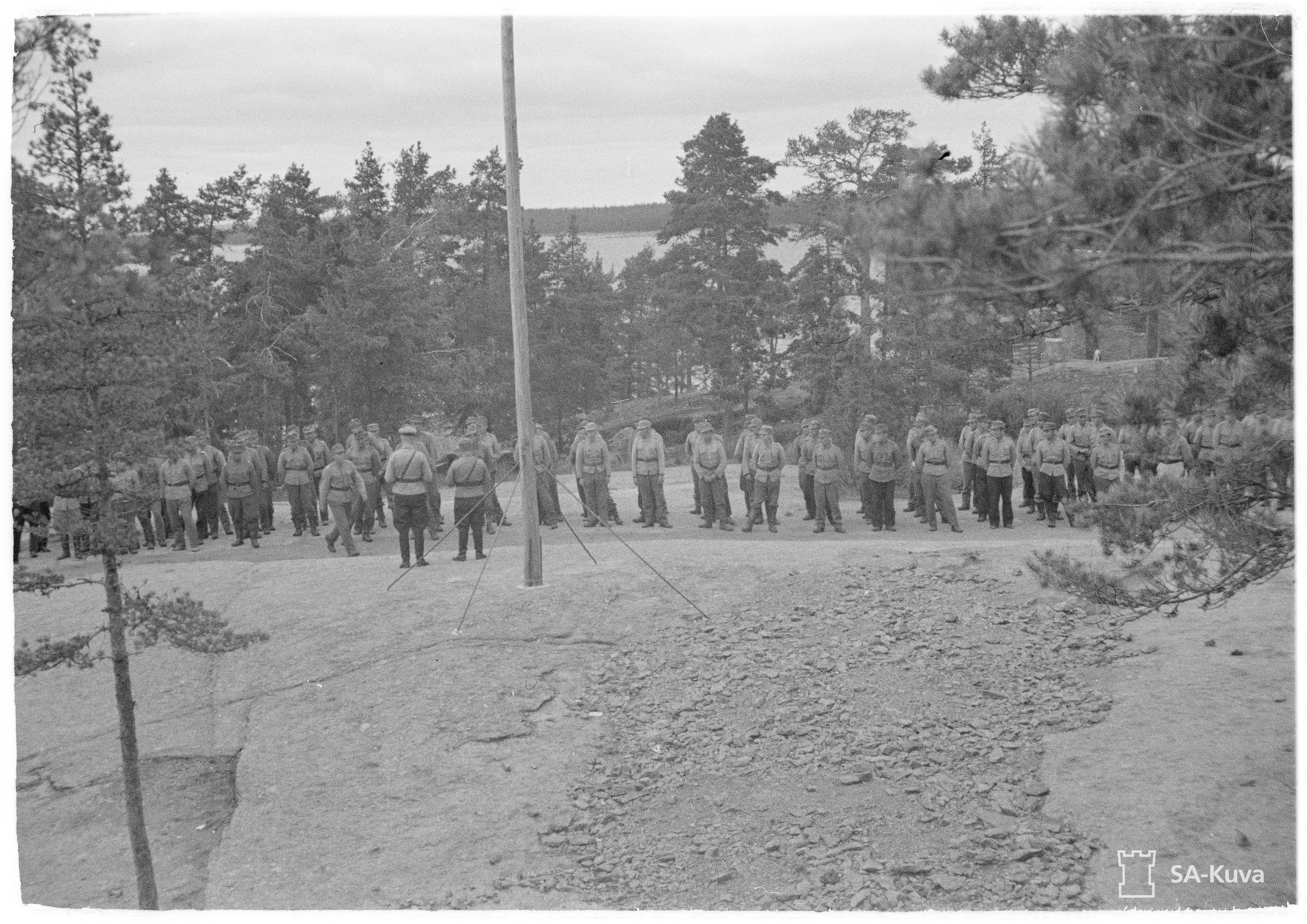 Kunniamerkkien jako Somerin taisteluissa kunnostautuneille sotilaille. Yleiskuva, otettu kasarmin katolta Mustamaa 1942.8.8.